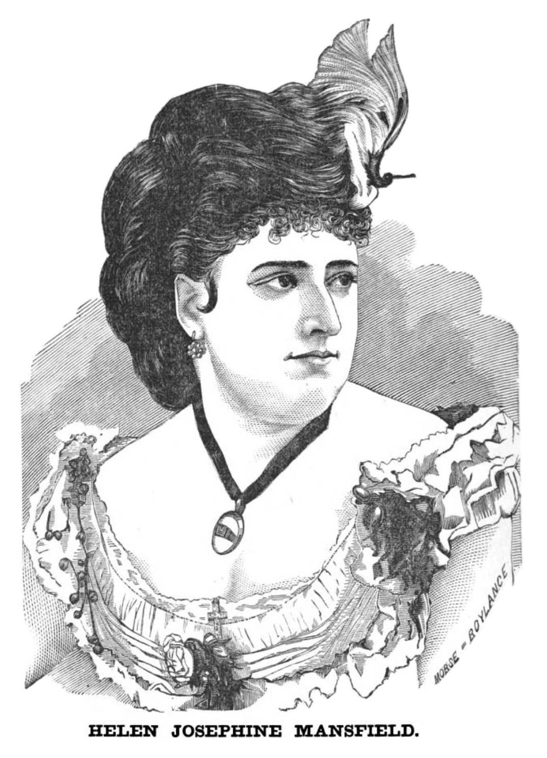 Helen Josephine Mansfield (1847–1931)